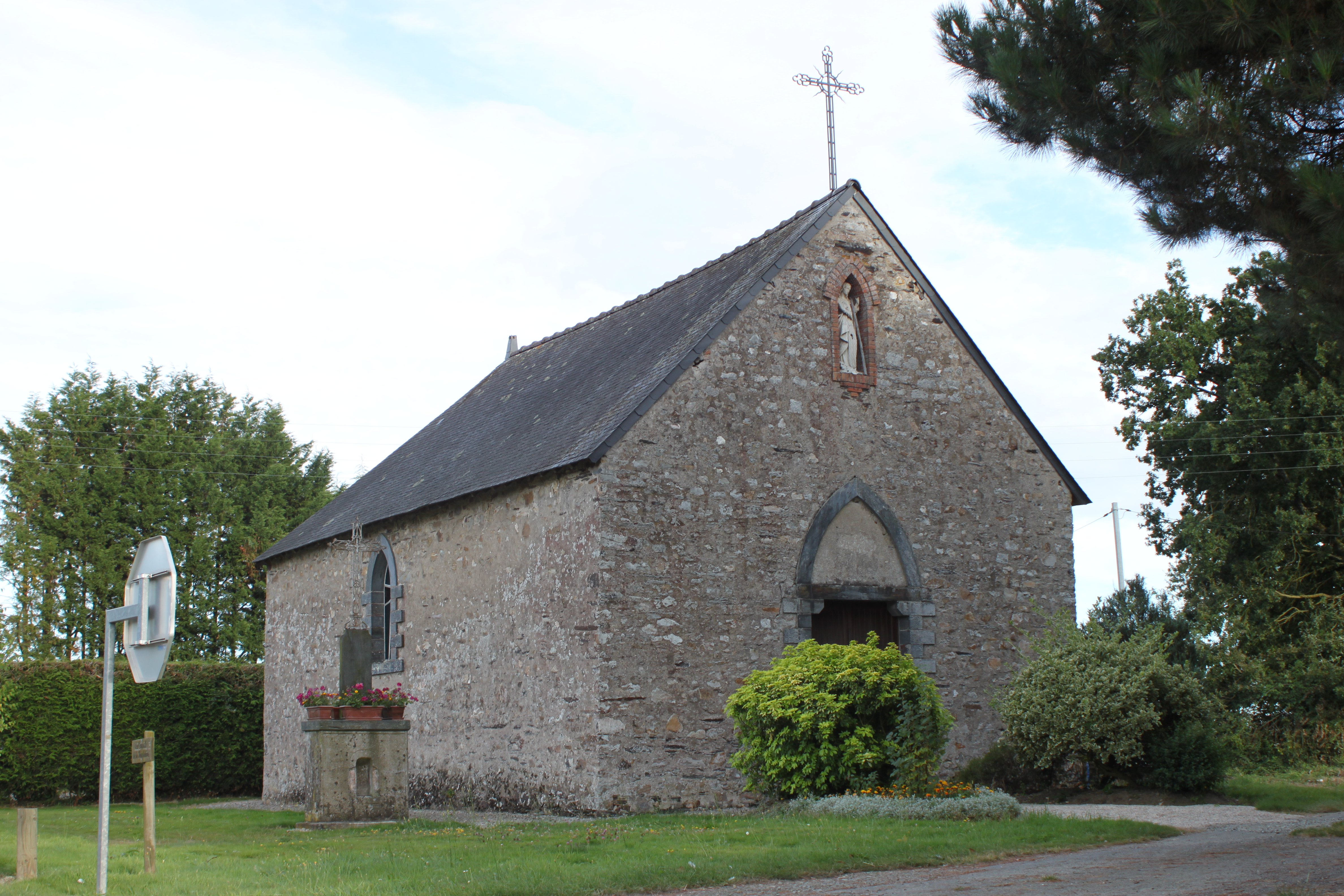 Chapelle de la Magdeleine, Fr-44-Saint-Vincent-des-Landes.